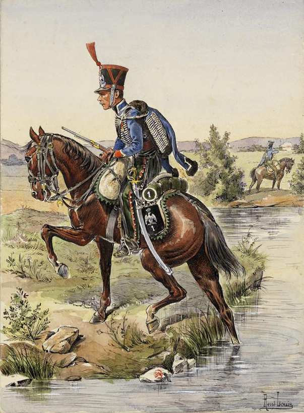 Compagnie d'élite du 1er Hussards en tenue de Campagne en 1813